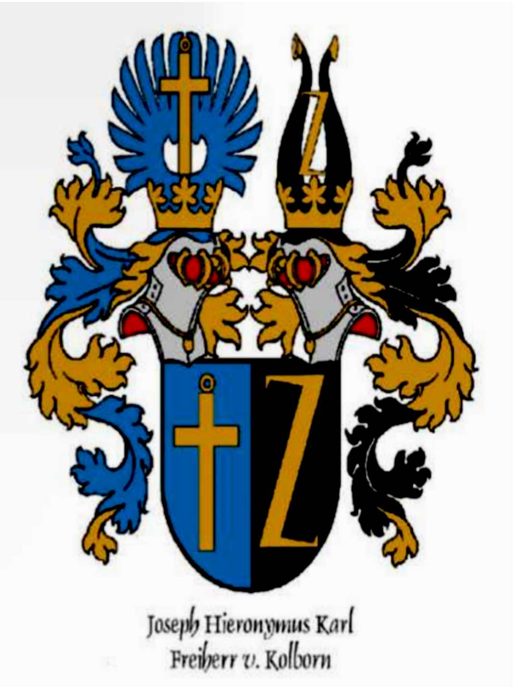 Joseph Hieronymus Karl Kolborn (1744-1816) Weihbischof in Mainz, m.Sitz in Aschaffenburg 1807-1816 Blasonierung: Schild von Blau und Schwarz gespaltet; vorn schwebend goldenes Brustkreuz mit Öse, hinten goldene, Z-förmige Wolfsangel (Stammwappen der Kolborn). Wappenzier: Zwei golden gekrönte Helme; rechts mit blau-goldenen Decken, darauf das goldene Brustkreuz mit Öse zwischen zwei blauen Flügeln, hinten mit schwarz-goldenen Decken die goldene Wolfsangel zwischen schwarzen Hörnern; Geistliche Würdezeichen fehlen